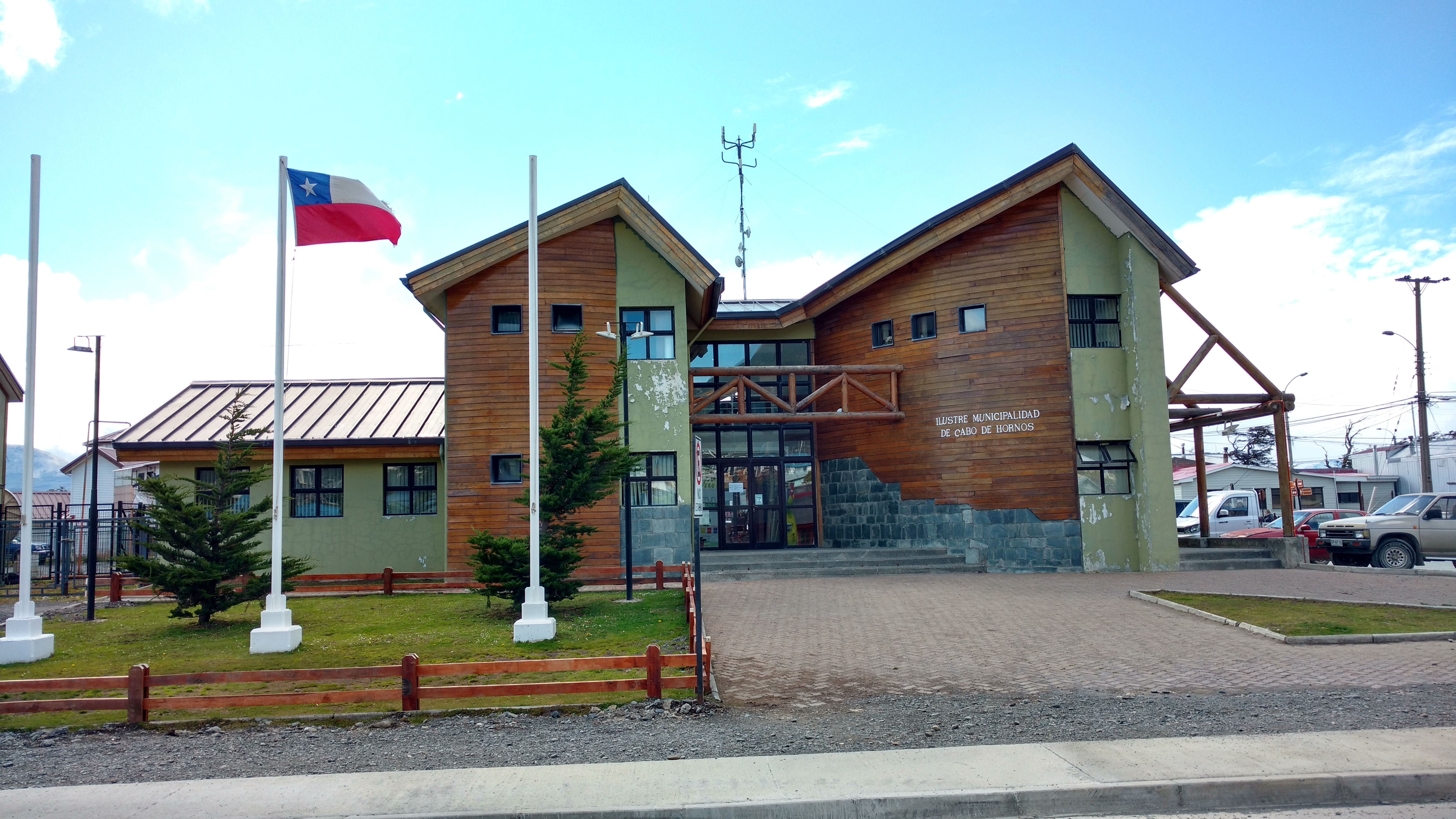 Fachada de la Ilustre Municipalidad de Cabo de Hornos, Chile